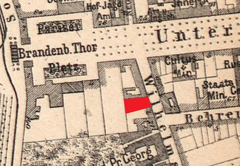 Lageplan des Hotels "Der Reichshof" in Berlin (1892/1893 - 1907).